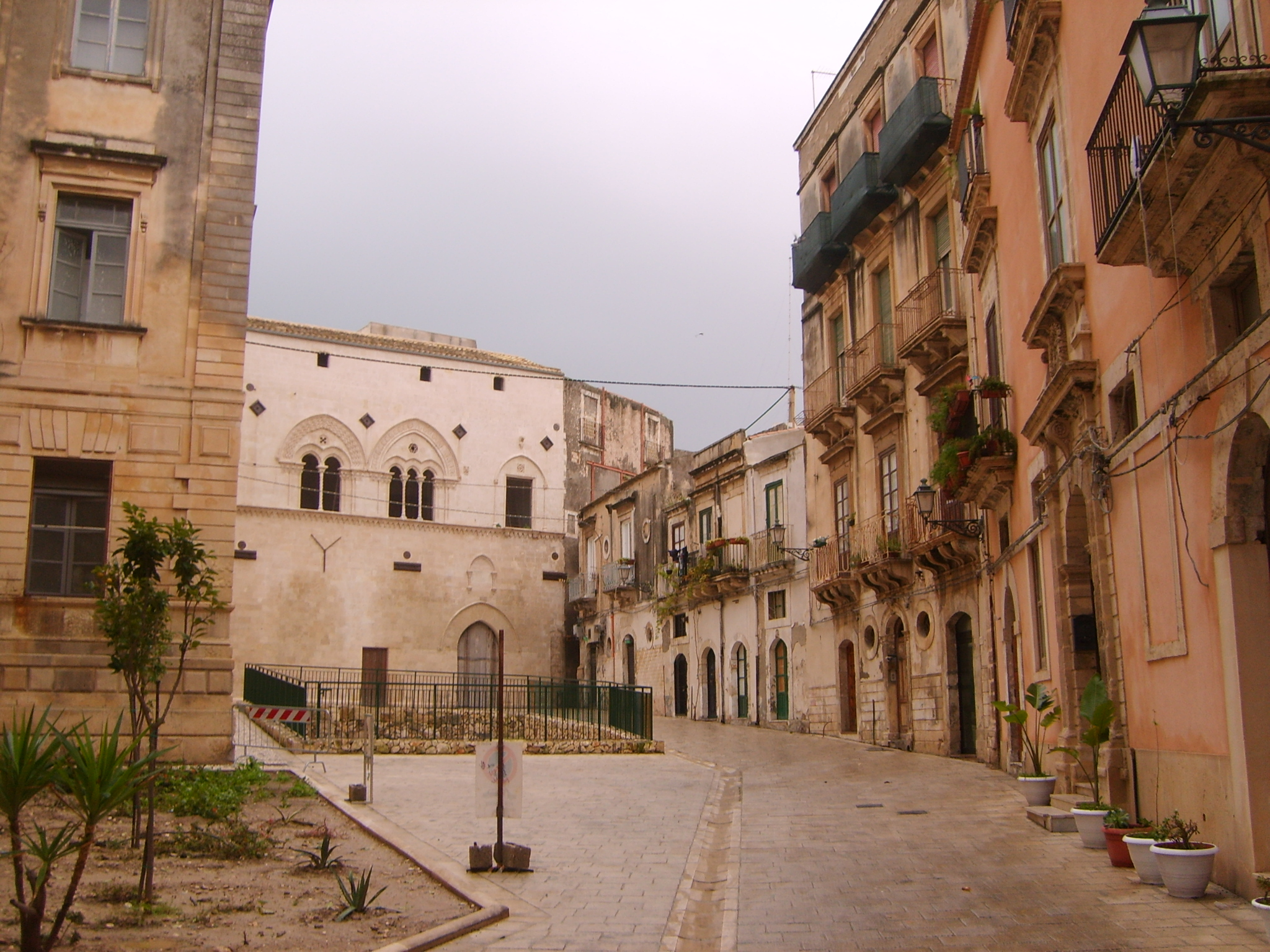 Il Palazzo Mergulese-Montalto a Siracusa (Ortigia), del 1397.